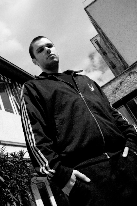 Orelsan (rappeur), Paris